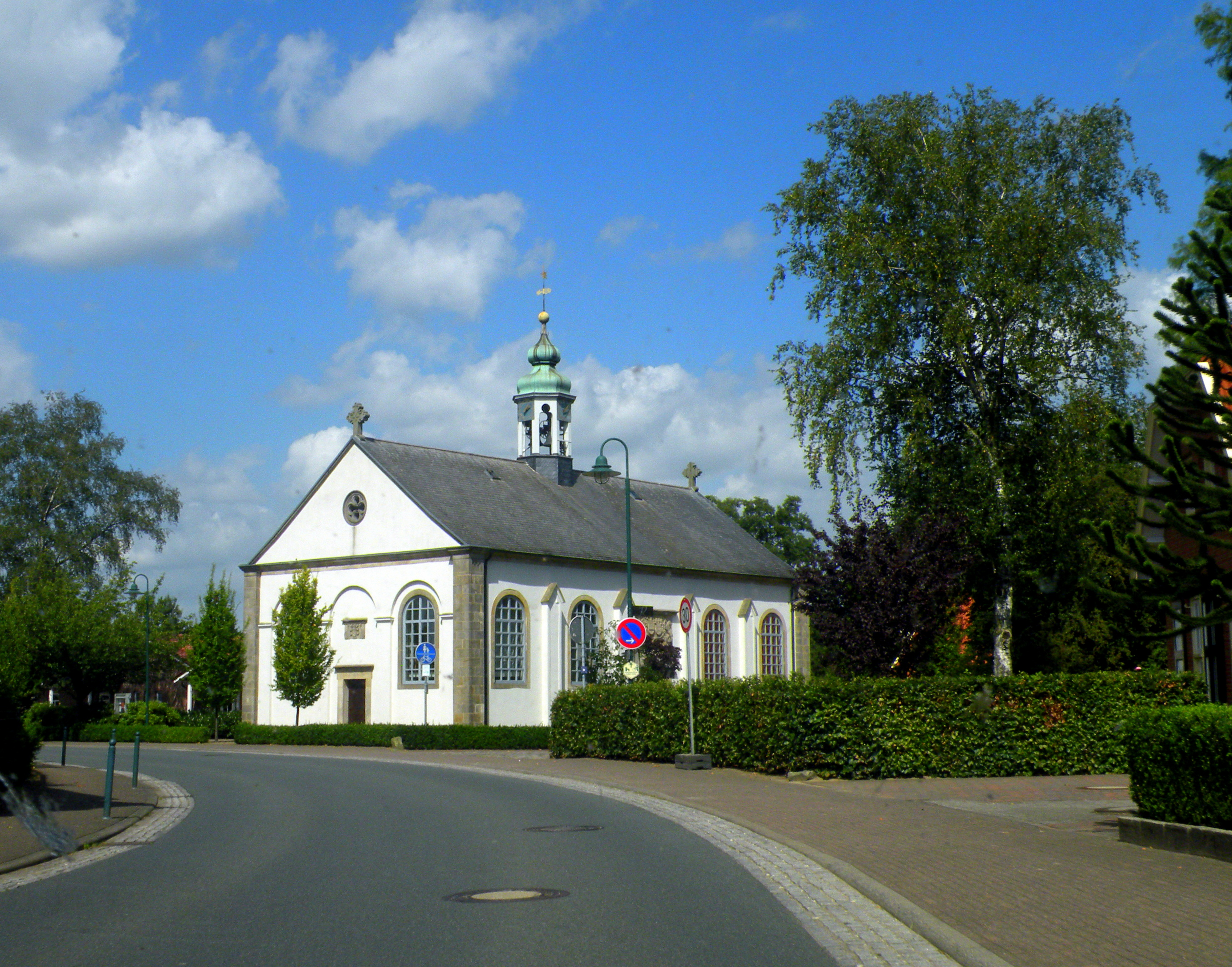 Lage (Duitsland), kerkje